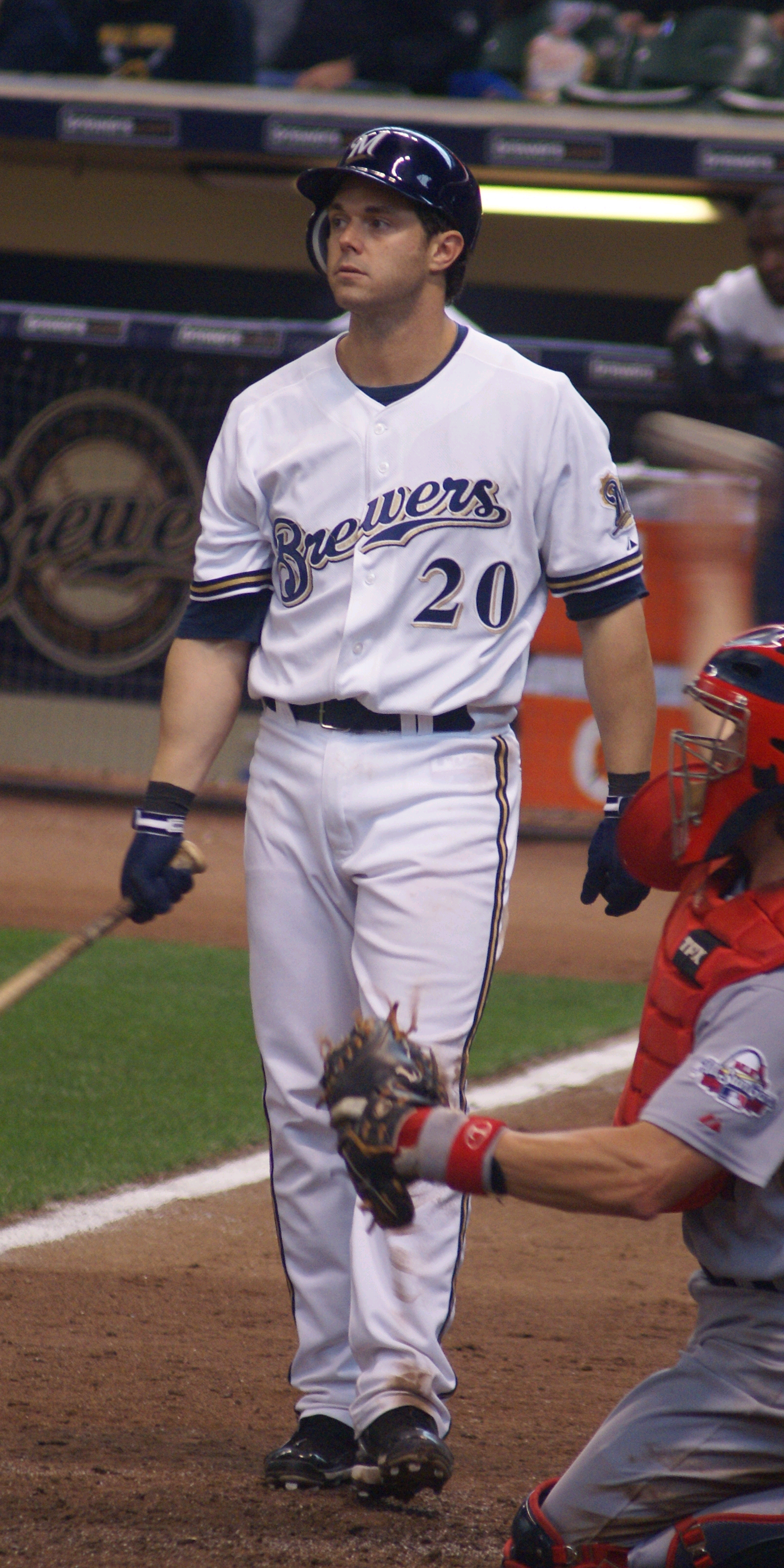 Frank Catalanotto